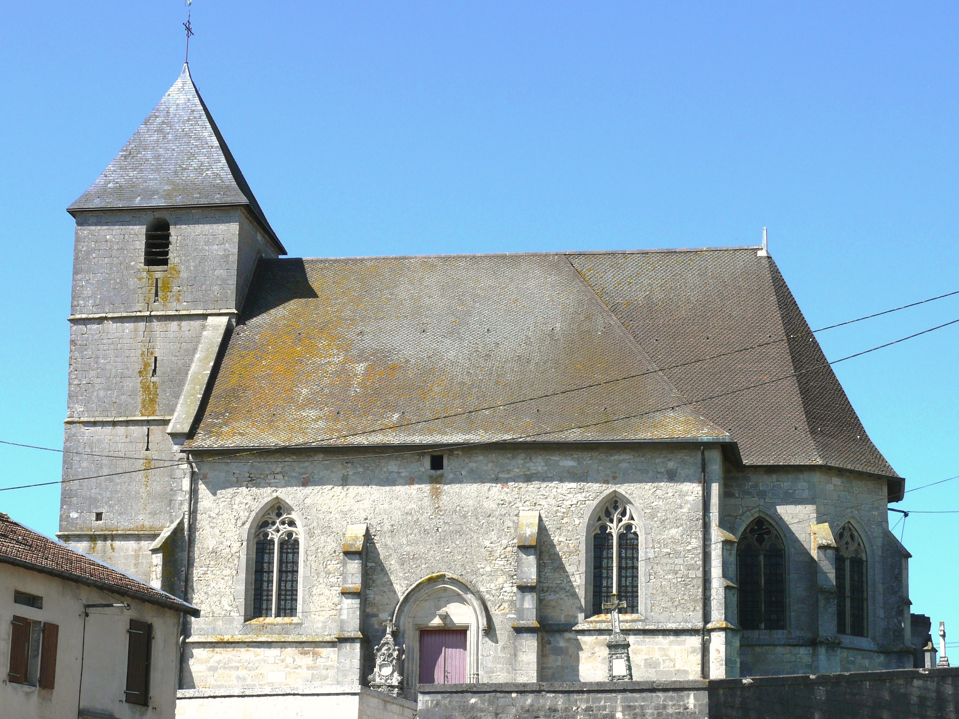 Génicourt-sur-Meuse - Eglise